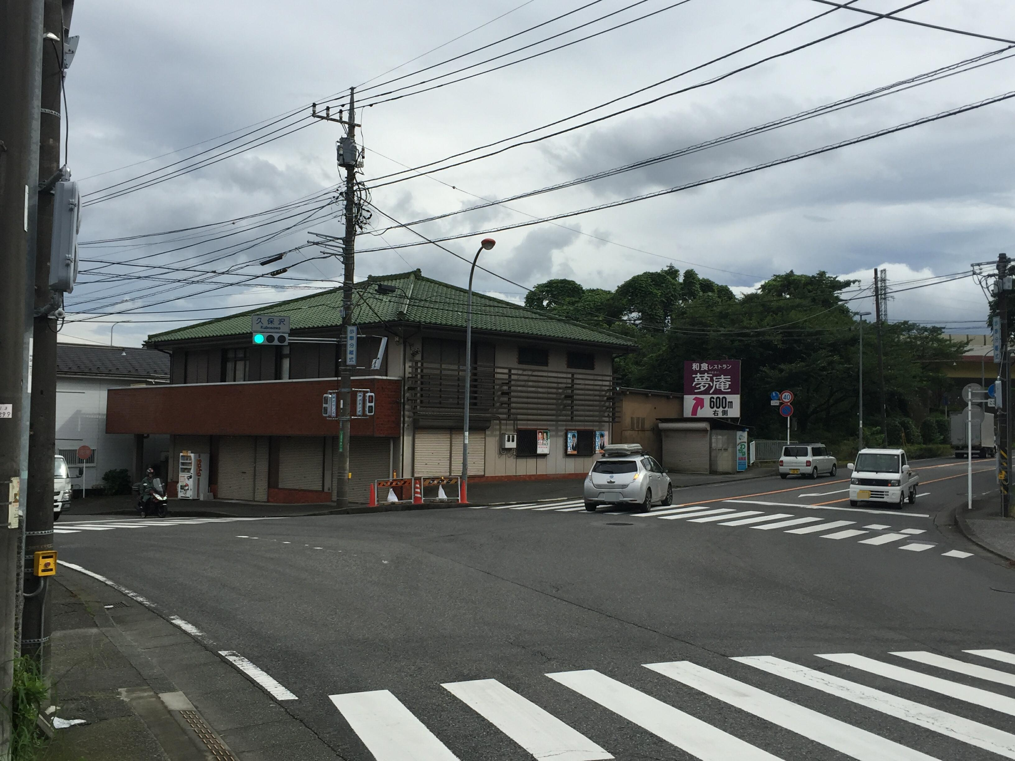 久保沢交差点（相模原市緑区久保沢）。国道413号線・津久井方面は右折。直進は県道510号線旧道・小倉橋方面。